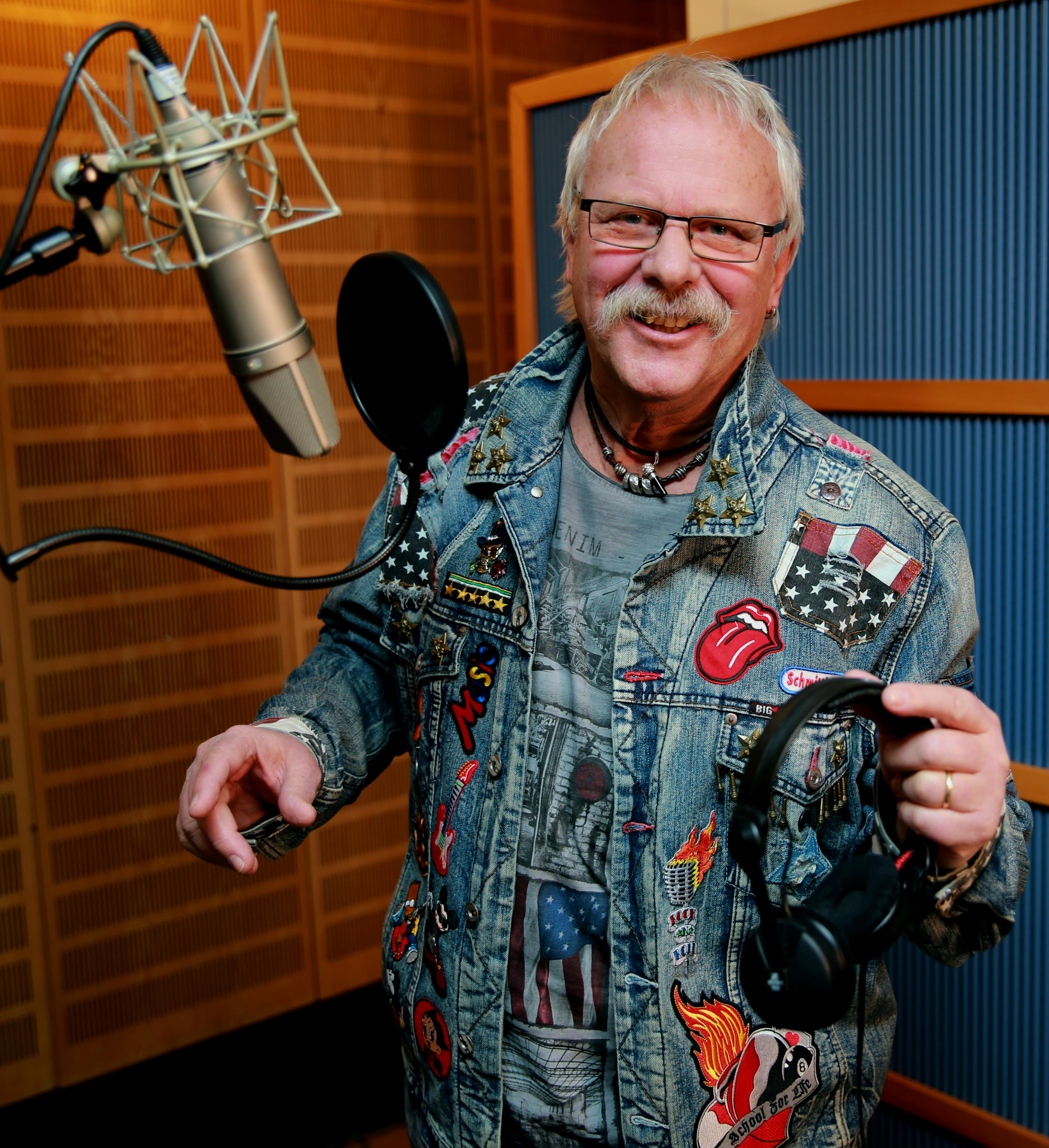 Schmitti im Tonstudio